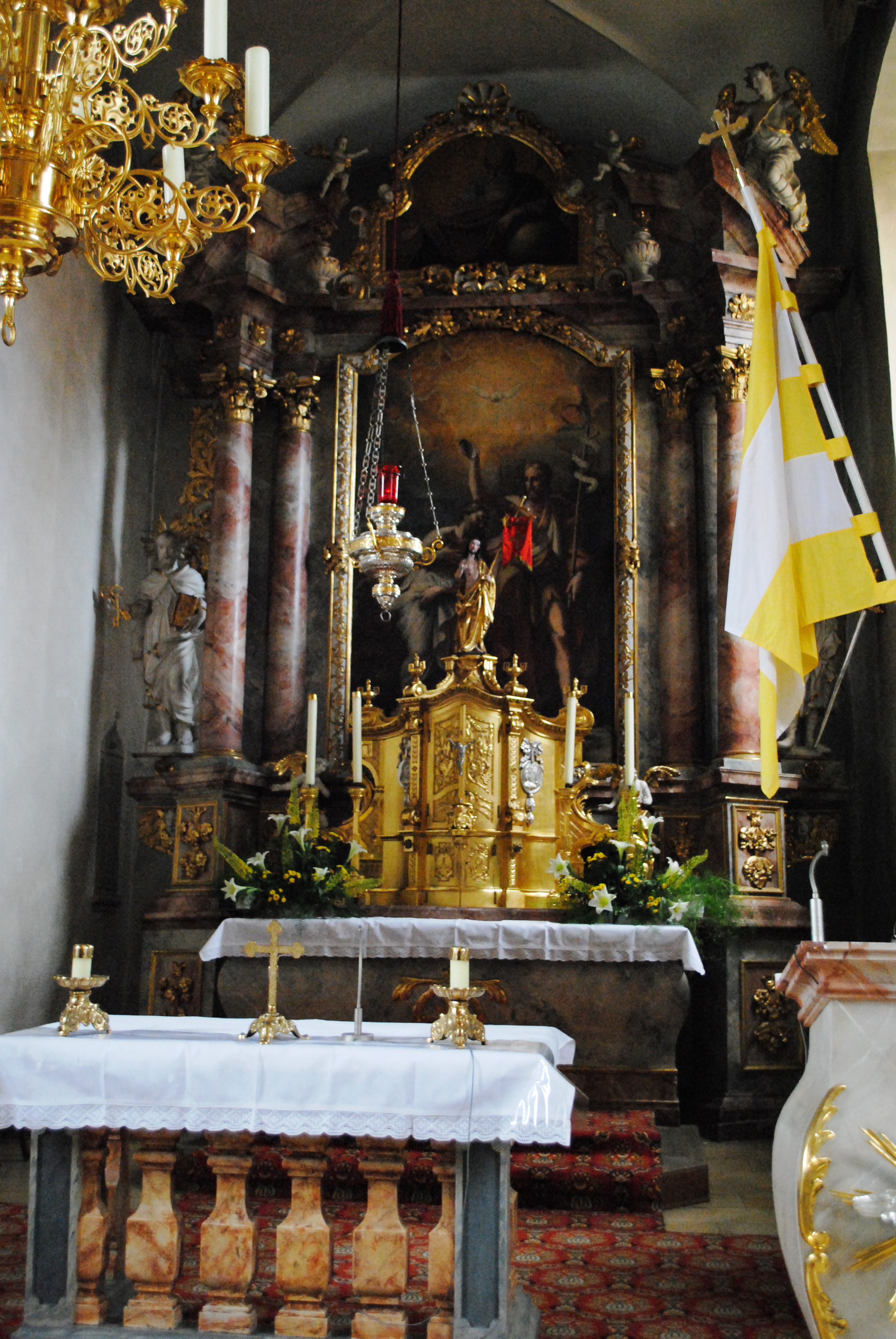 Hochaltar, Kirche, Fahr